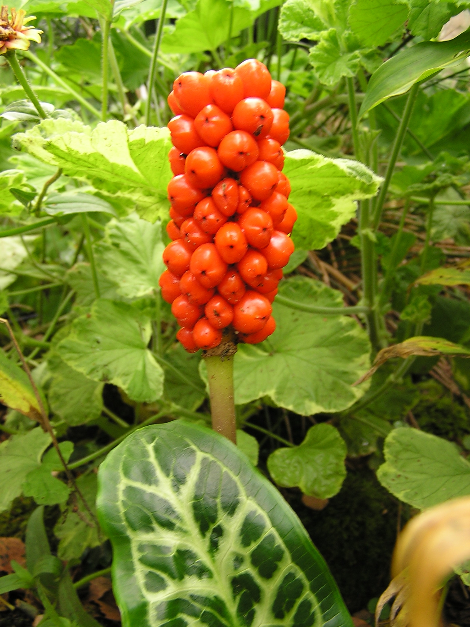 Aronstab Frucht, (Arum italicum)